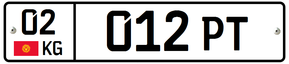 پلاک جدید جمهوری قرقیزستان